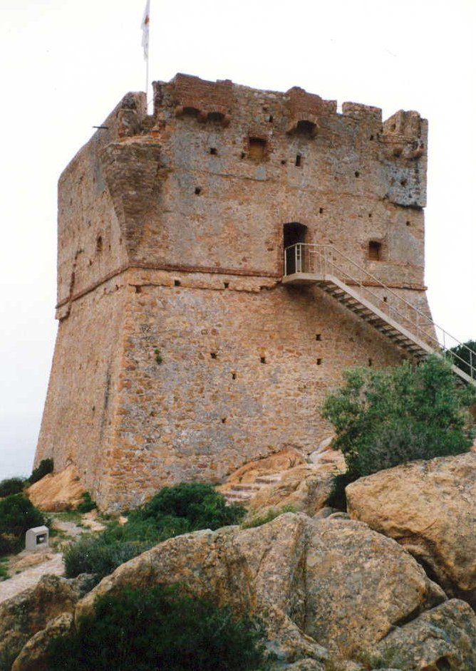 Ein Genueserturm bei Porto, eigenes Bild